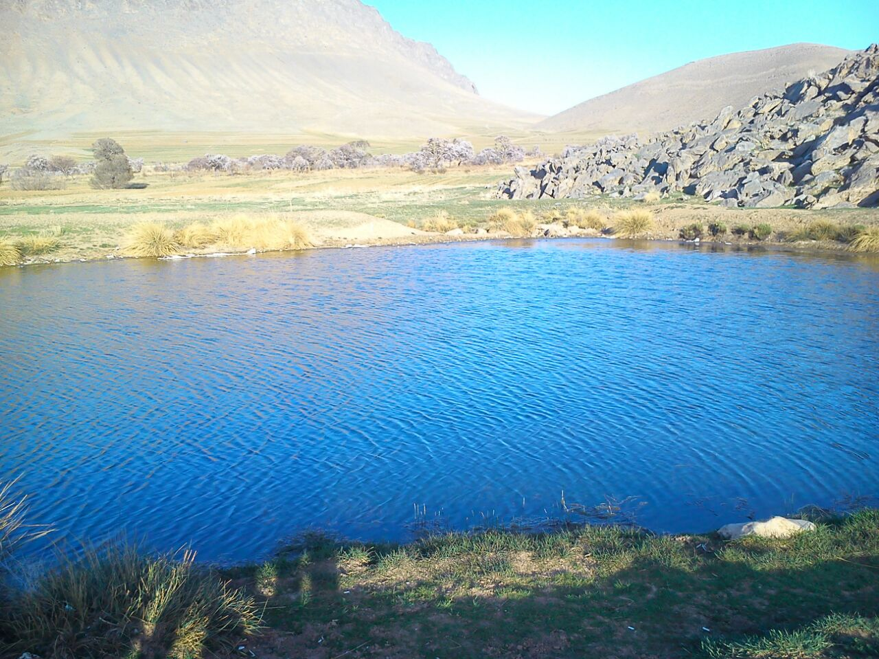 سراب چناس